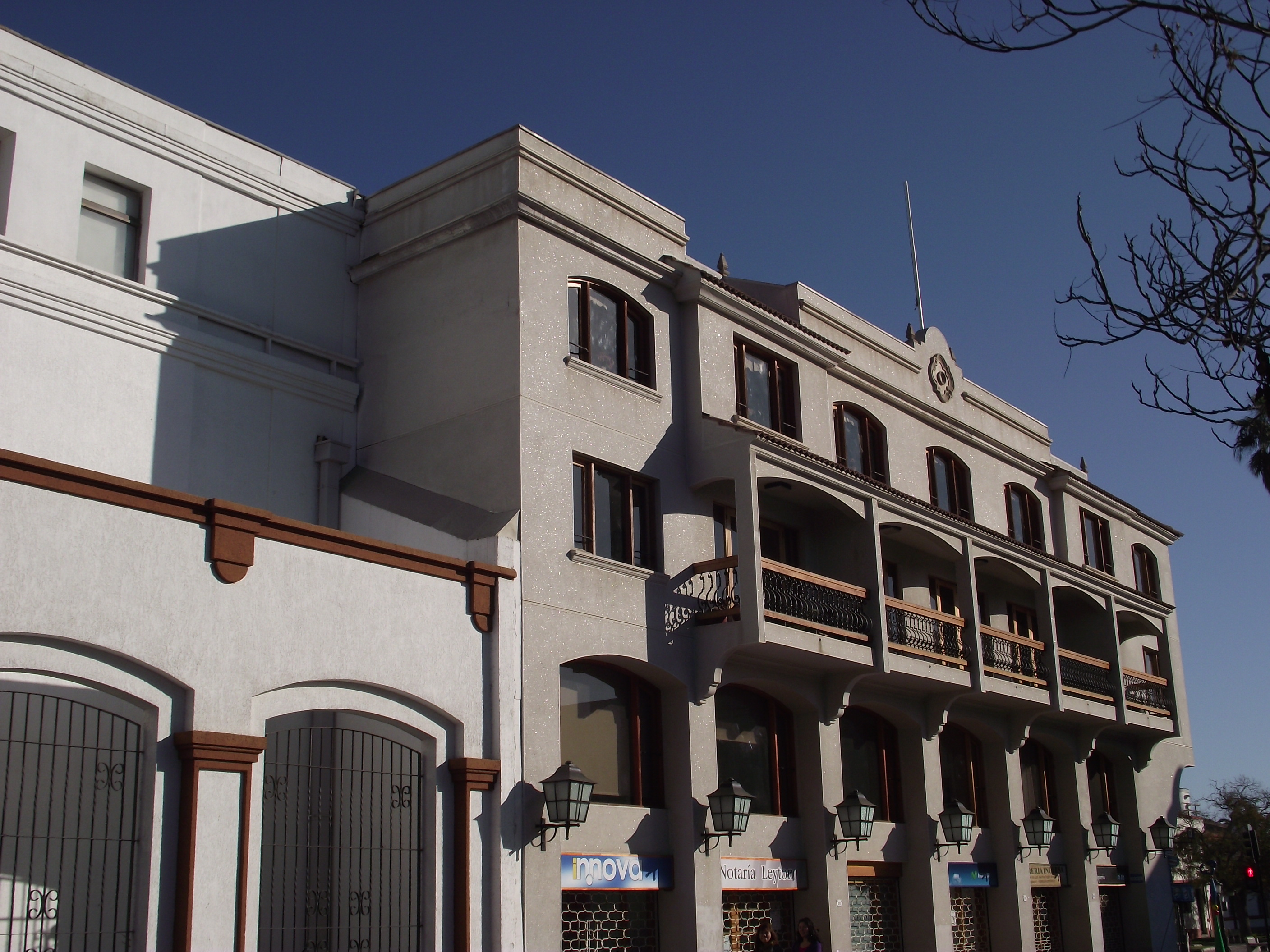 Edificio Gabriel González Videla, ubicado frente a la Plaza de Armas de La Serena.